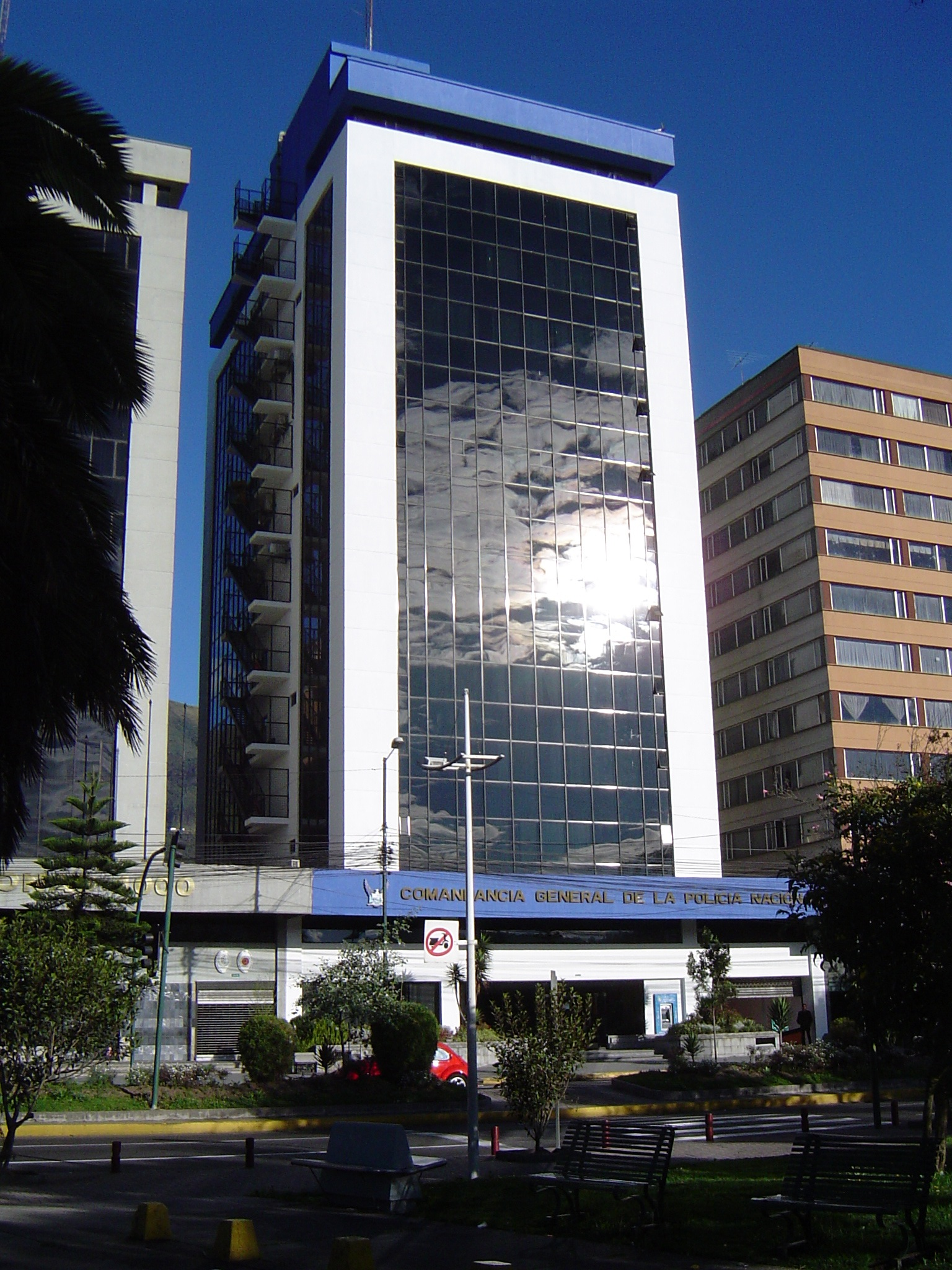 Cuartel General de la Policía Nacional del Ecuador en la avenida Amazonas y calle Juan Sanz en Quito.